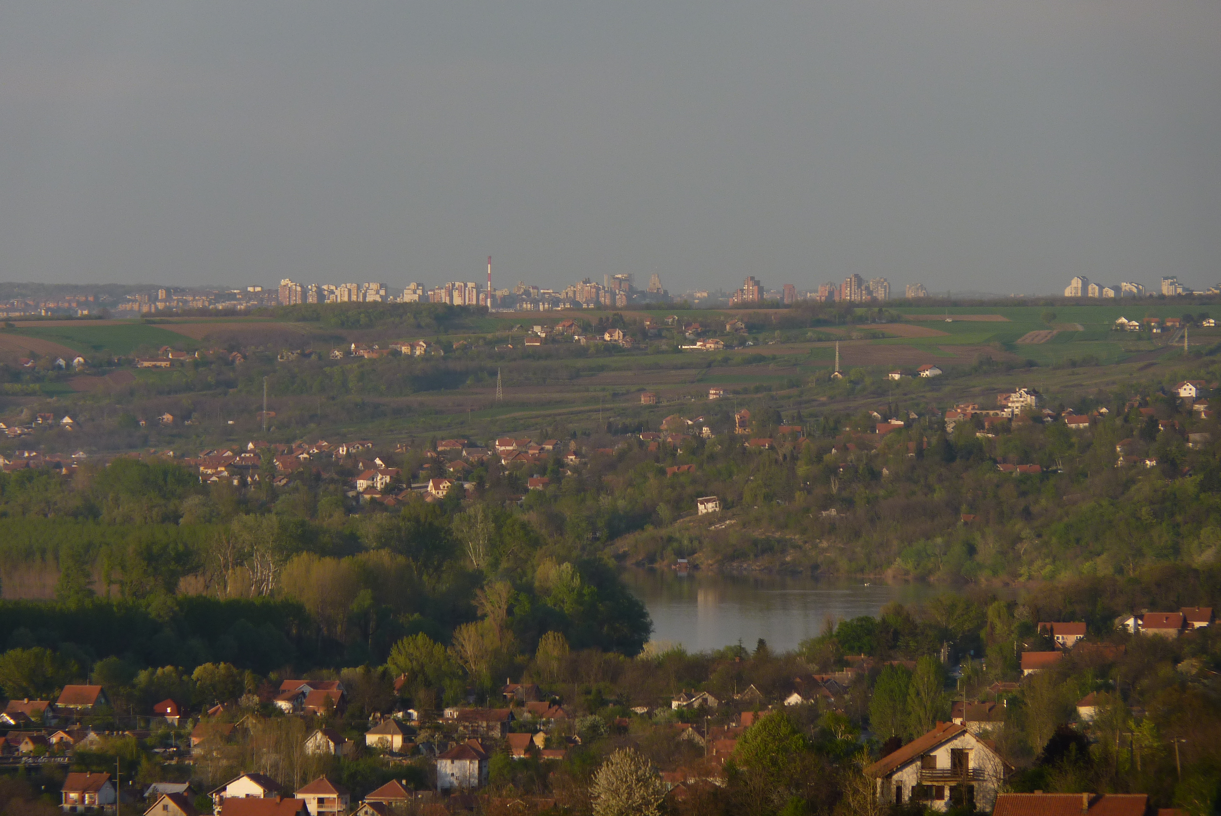 Pogled sa brda iz Bariča